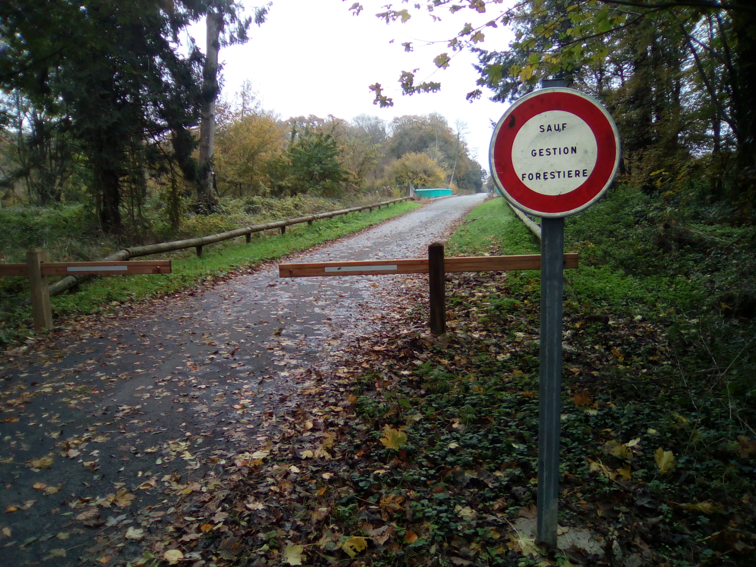 Forest-Montiers, Somme, Fr, entrée forêt de Crécy interdite à la circulation des véhicules particuliers au 1er novembre 2019 par les services de l'Office National des Forêts.